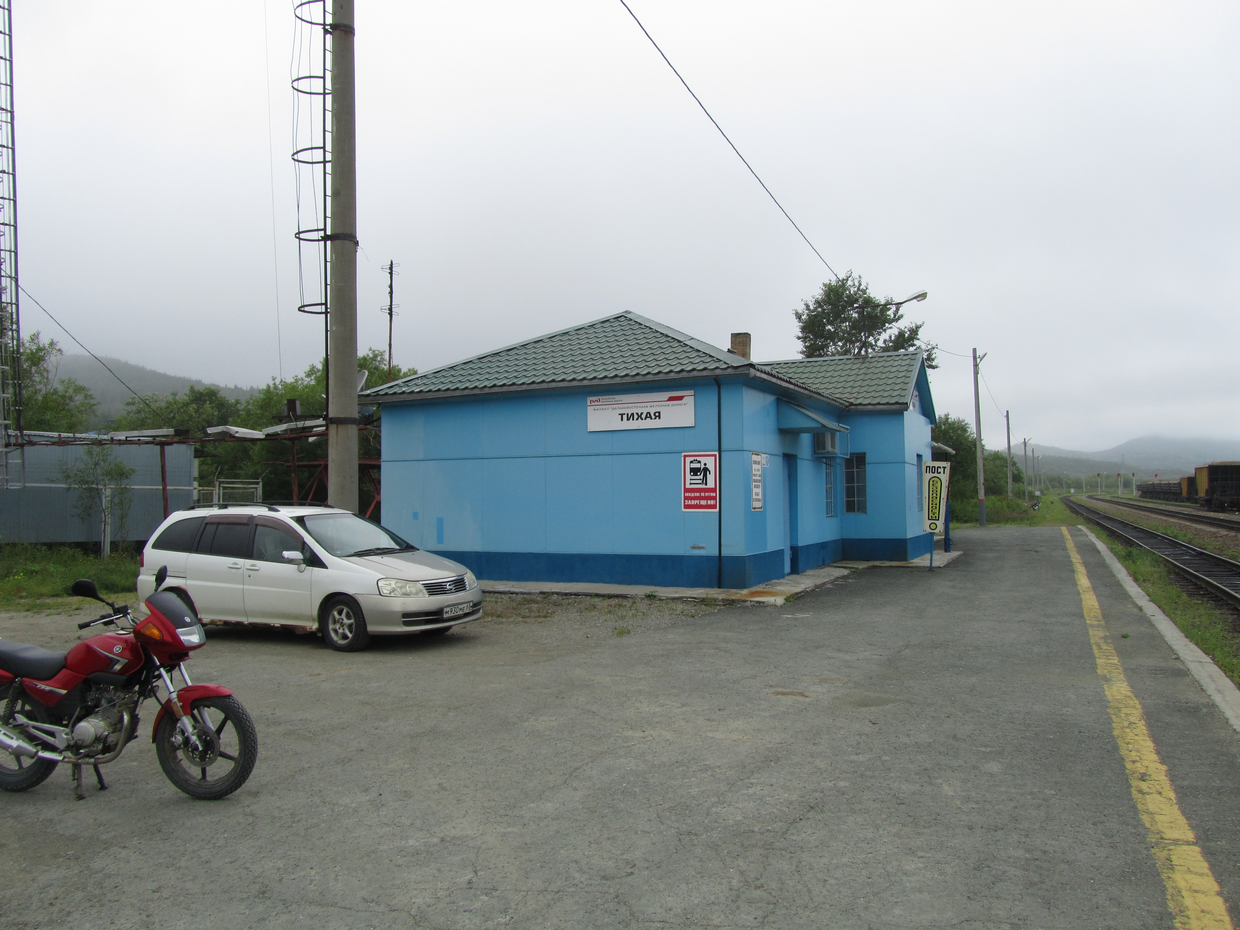 Станция Тихая Сахалинского региона ДВЖД